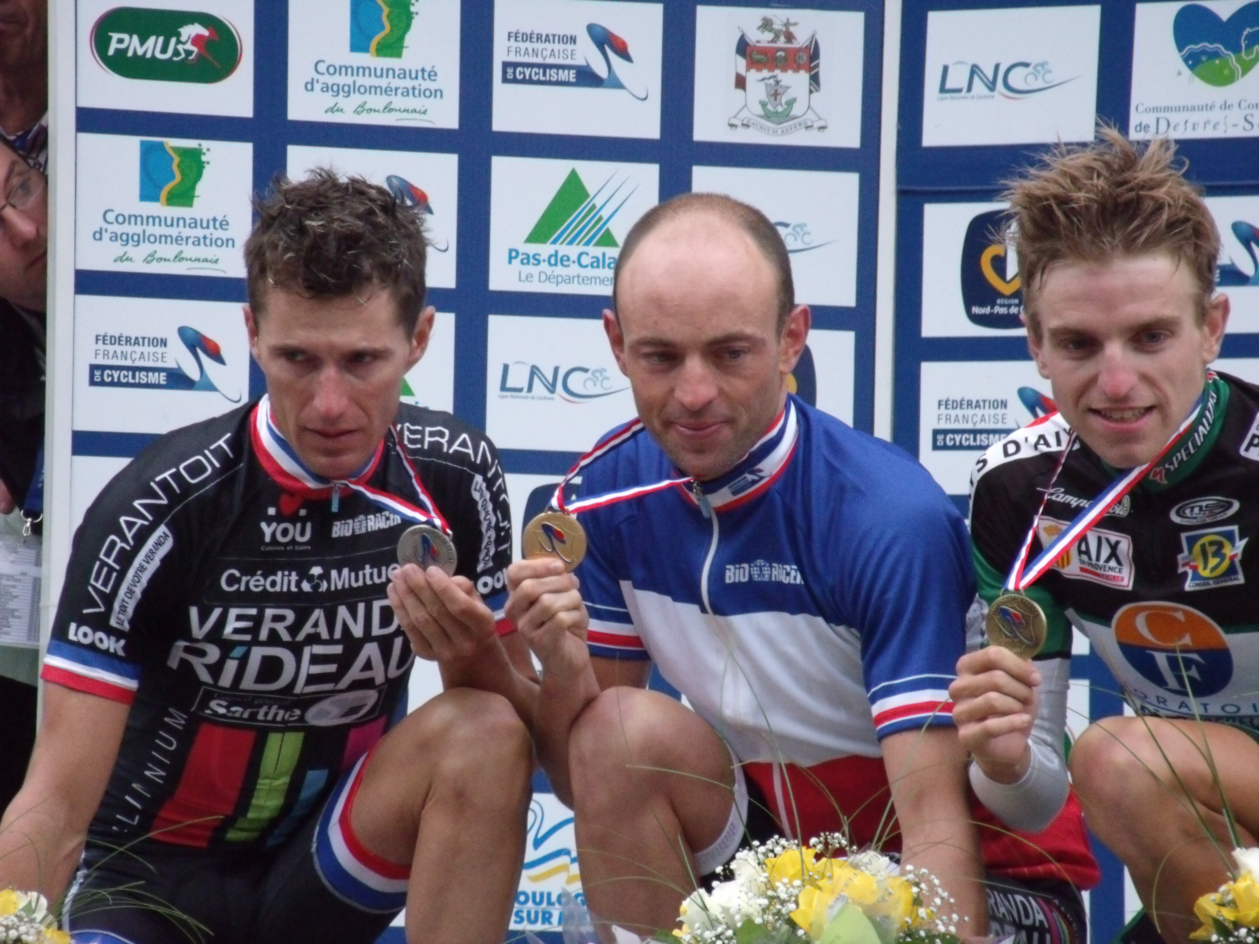 Samuel Plouhinec, Freddy Bichot et Matthieu Converset sur le podium du championnat de France 2011